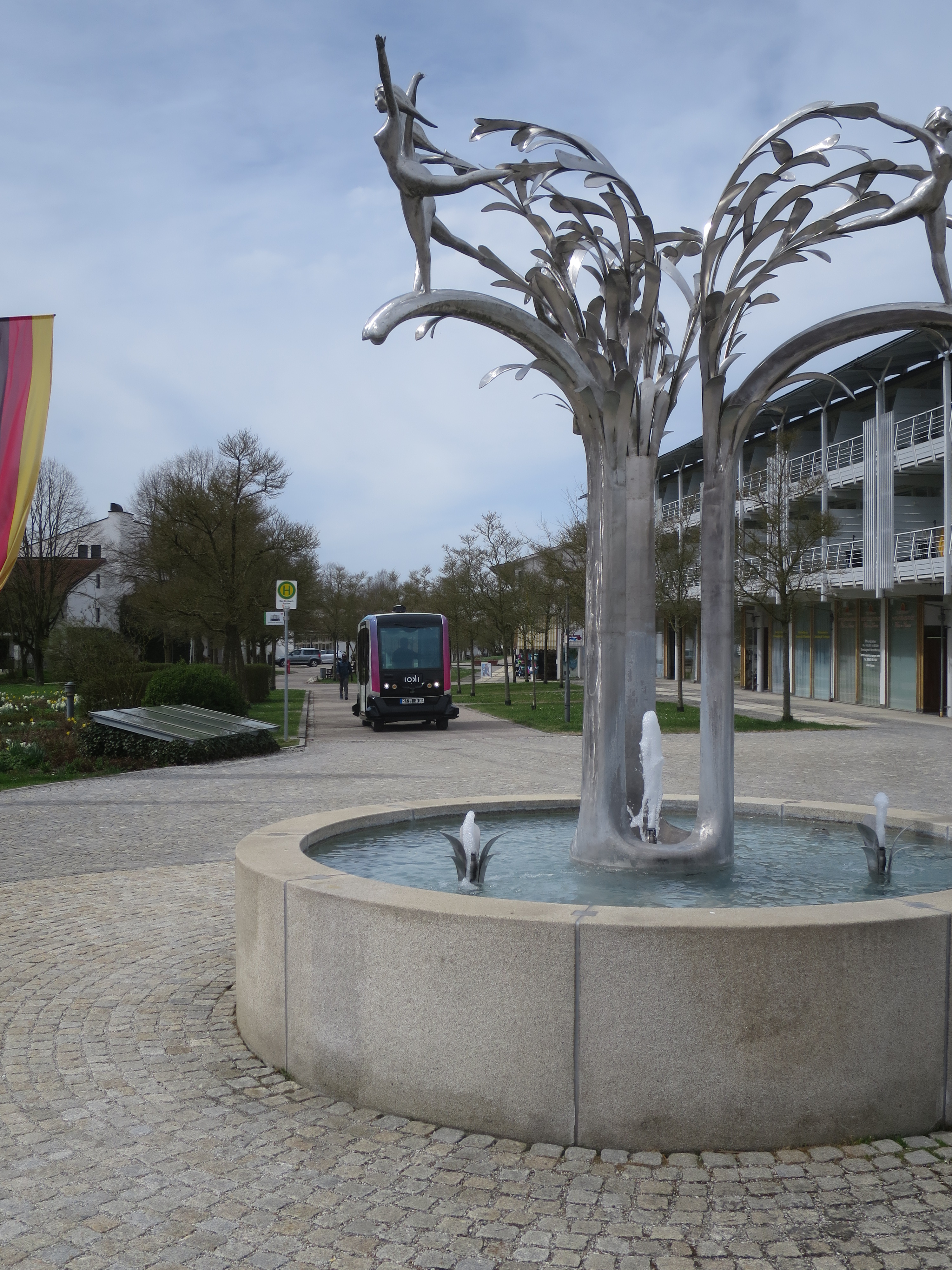 ioki-Bus, Bad Birnbach vor dem Artrium